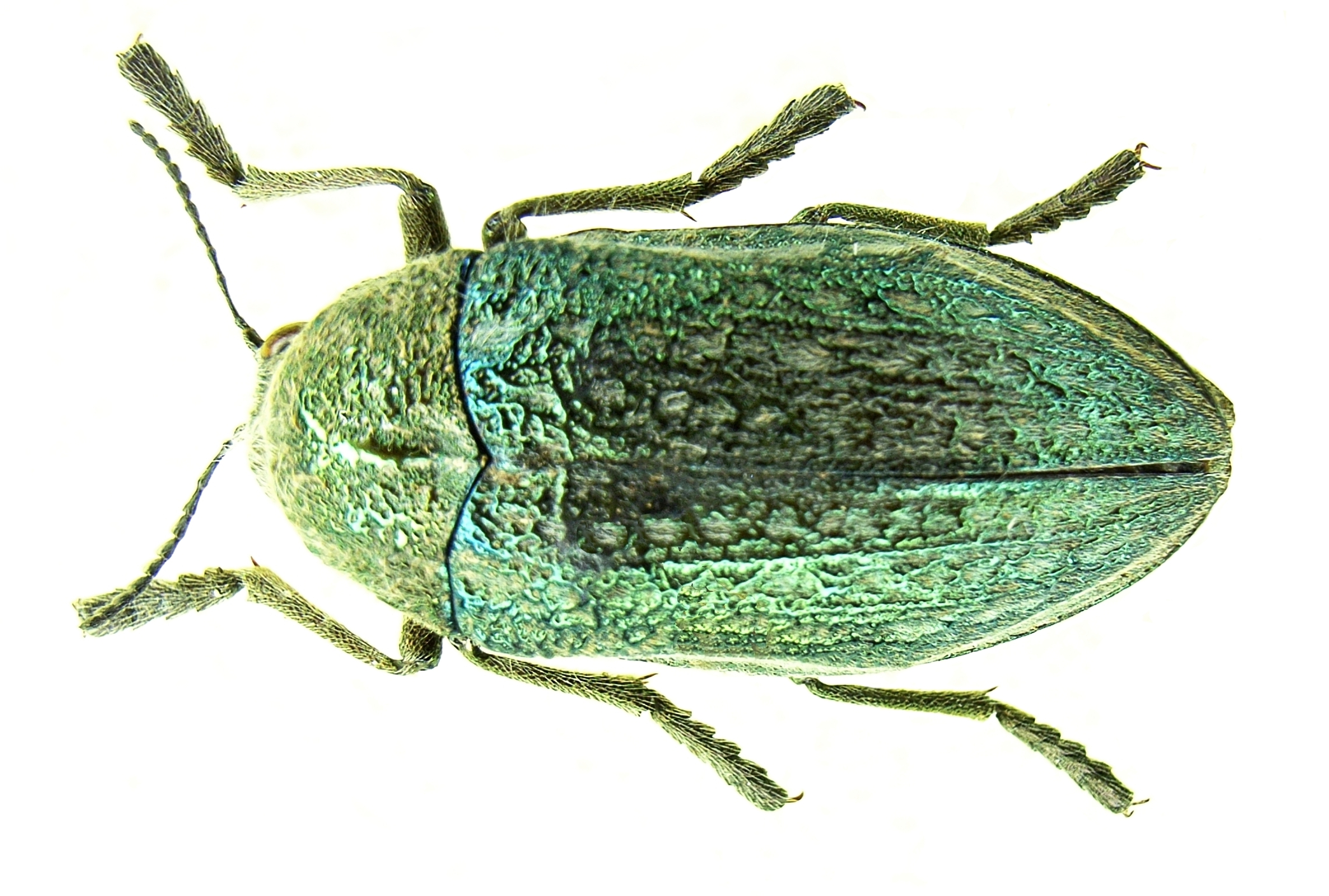 Julodis ehrenbergii from Greece